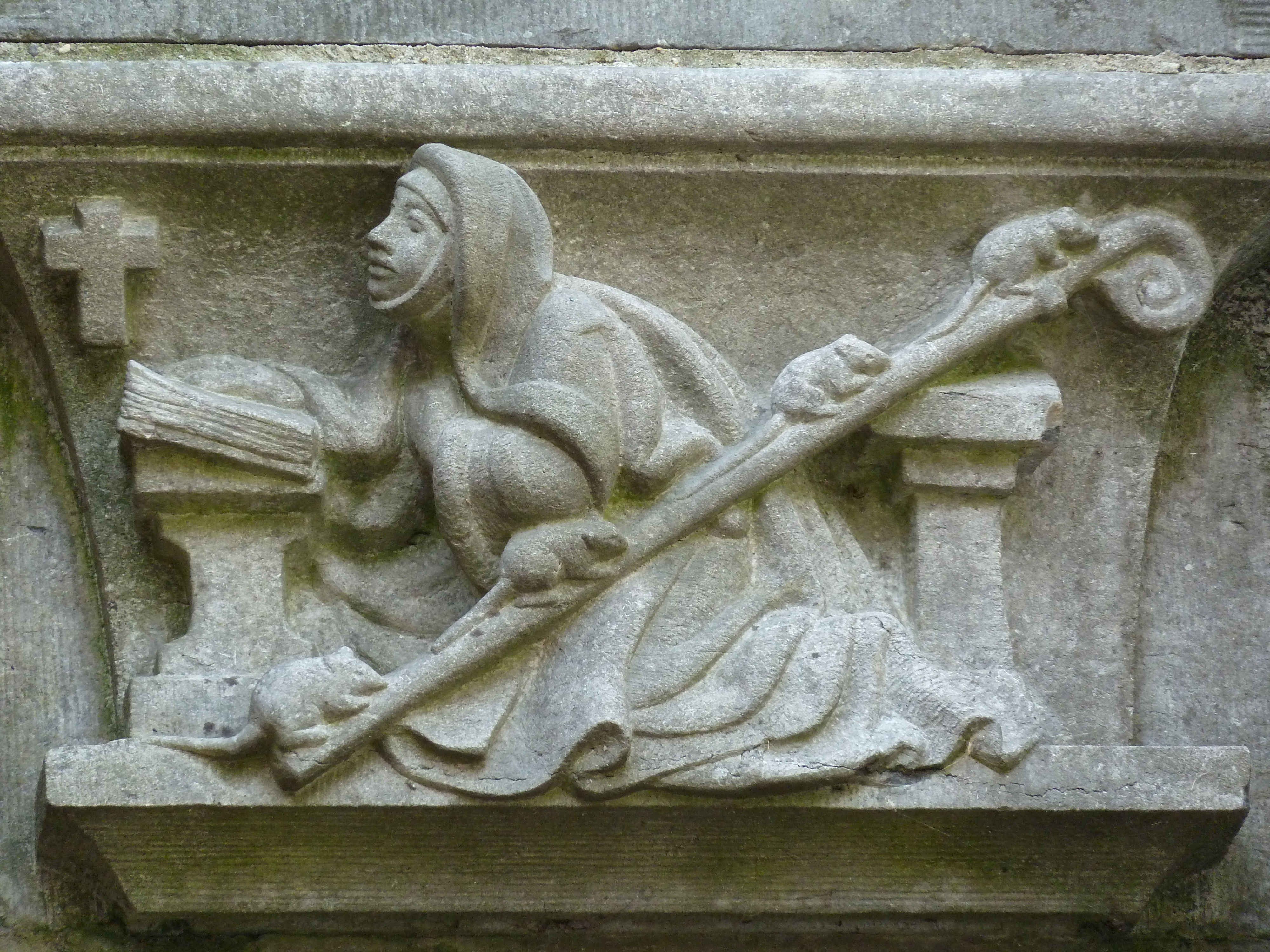 Straatlantaarnconsole bij Oudegracht 321, Utrecht, NL.